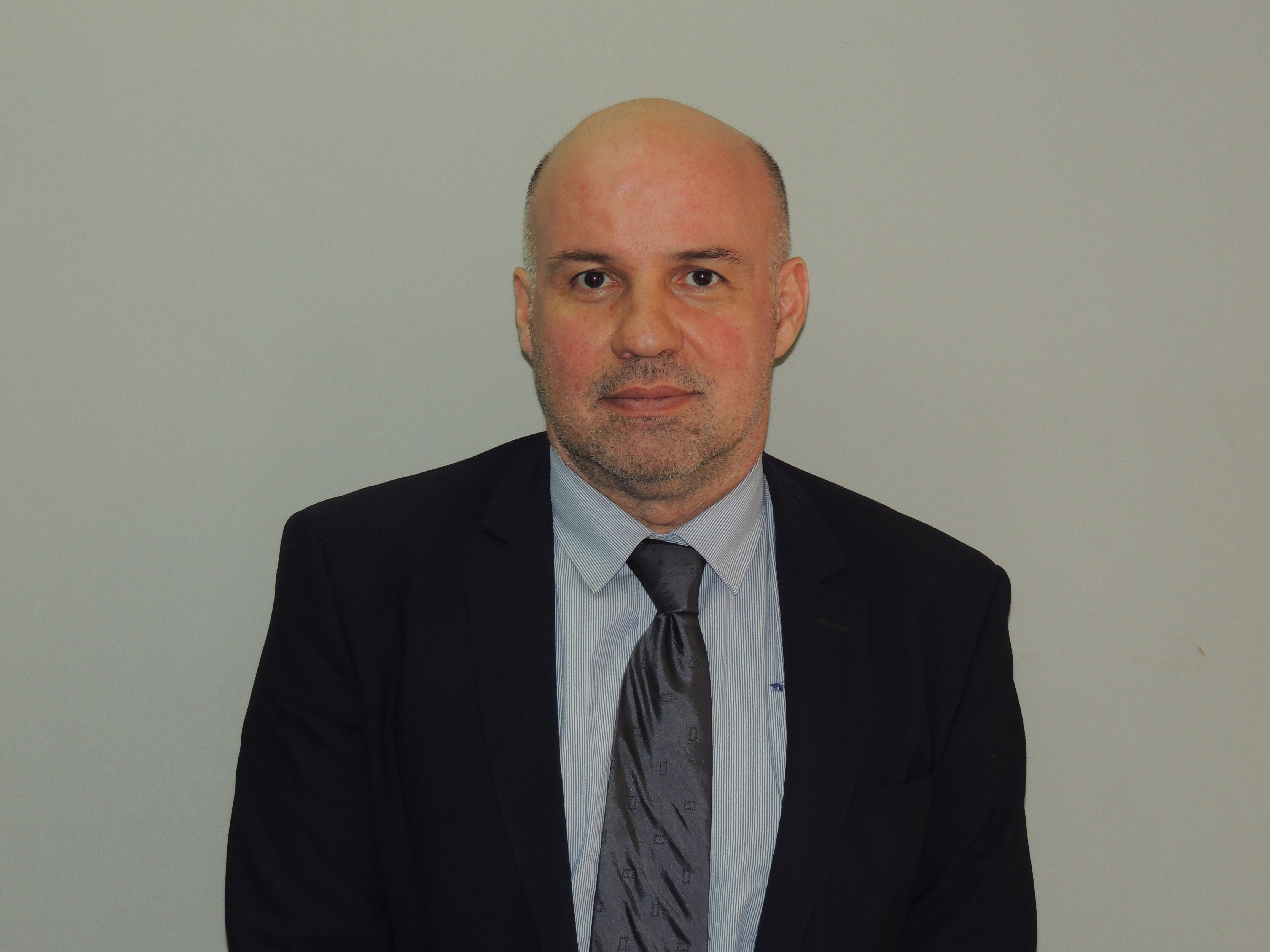 Ignacio Ubaldo González Vega, portavoz de Juezas y Jueces para la Democracia